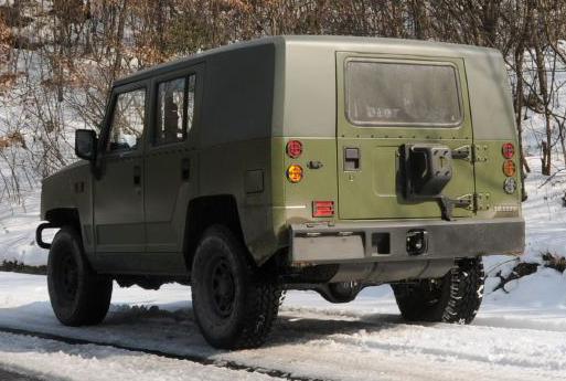 Beijing BAW BJ2022JLC Warrior